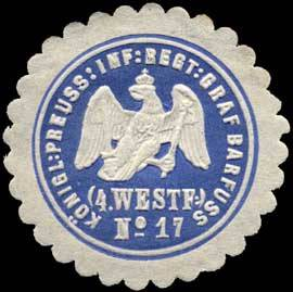 Sealing stamp Title: K. Pr. Infanterie Regiment Graf Barfuss (4. Westfälisches) No. 17 Description: Place: Mörchingen size: 3 cm